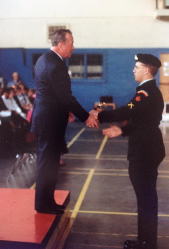 Le Col(ret) Berthiaume avait à coeur le mouvement des cadets.